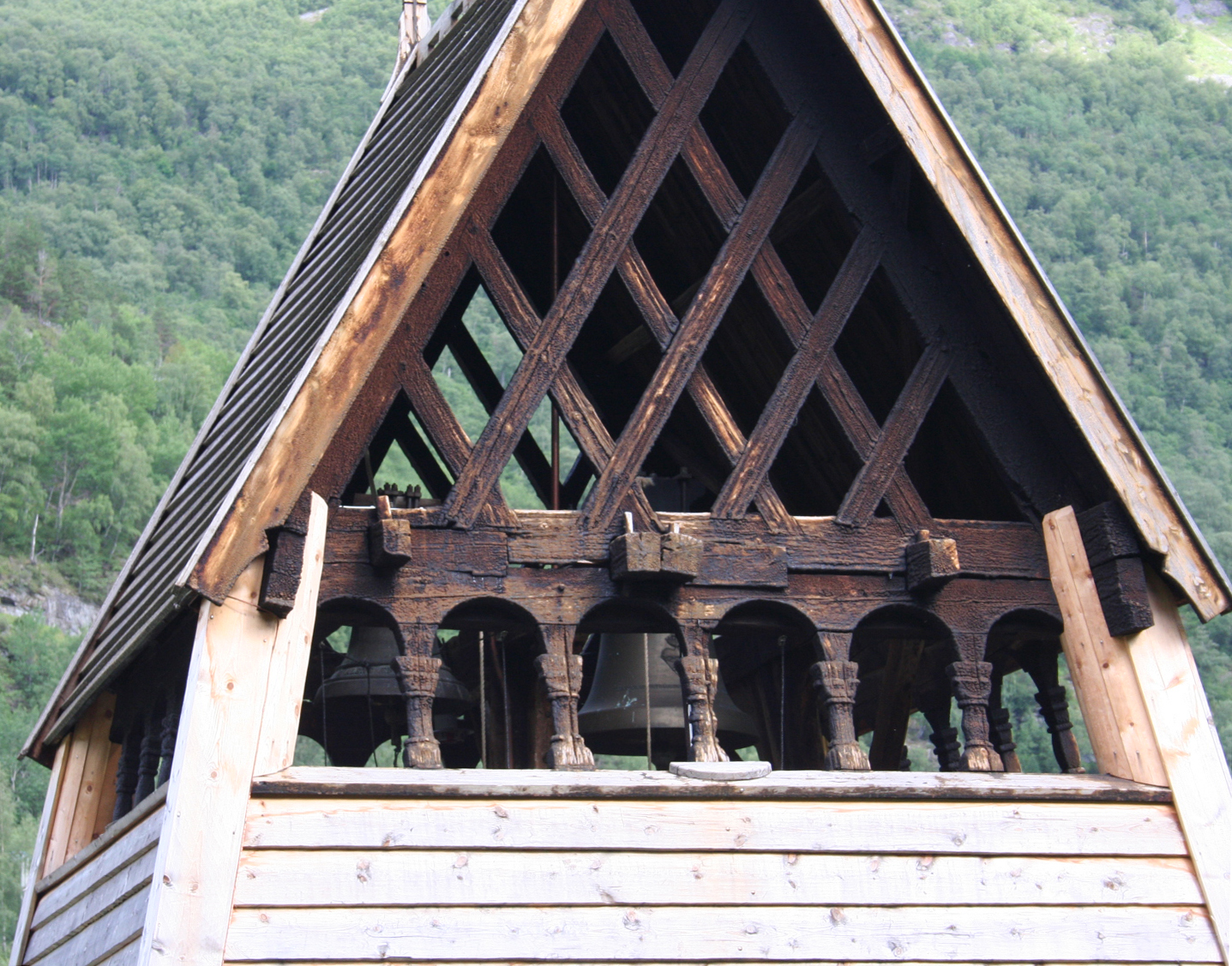 Borgund Stabkirche, Glockenturm